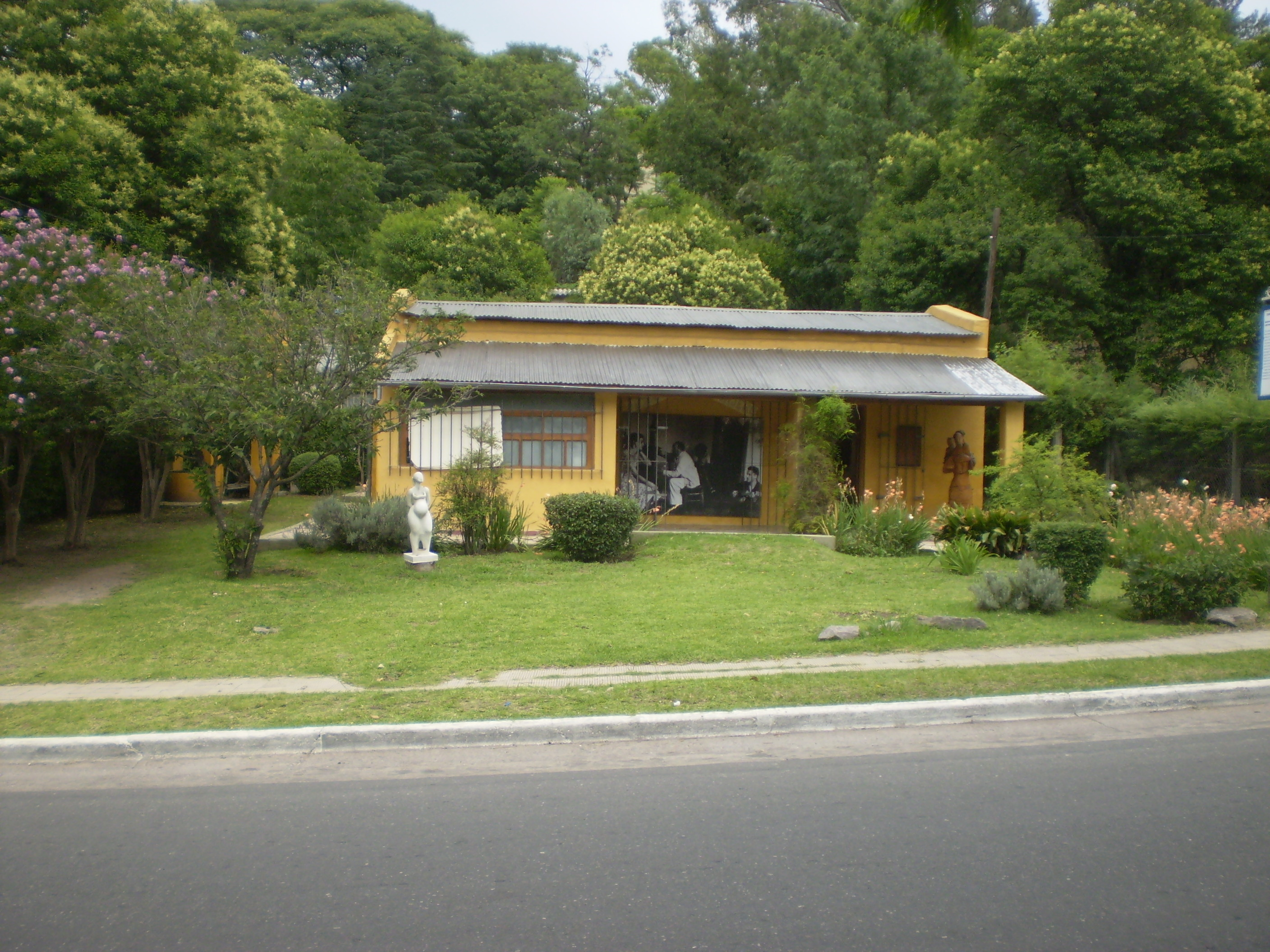 Casa Museo Lino E. Spilimbergo, Unquillo, Cordoba, Argentina